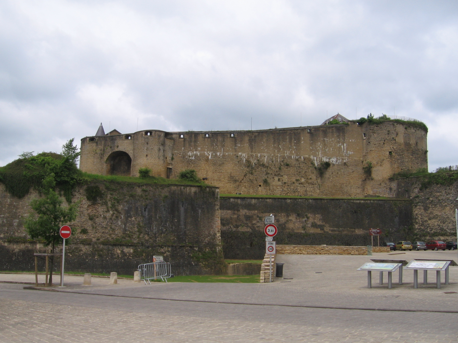 Sedan